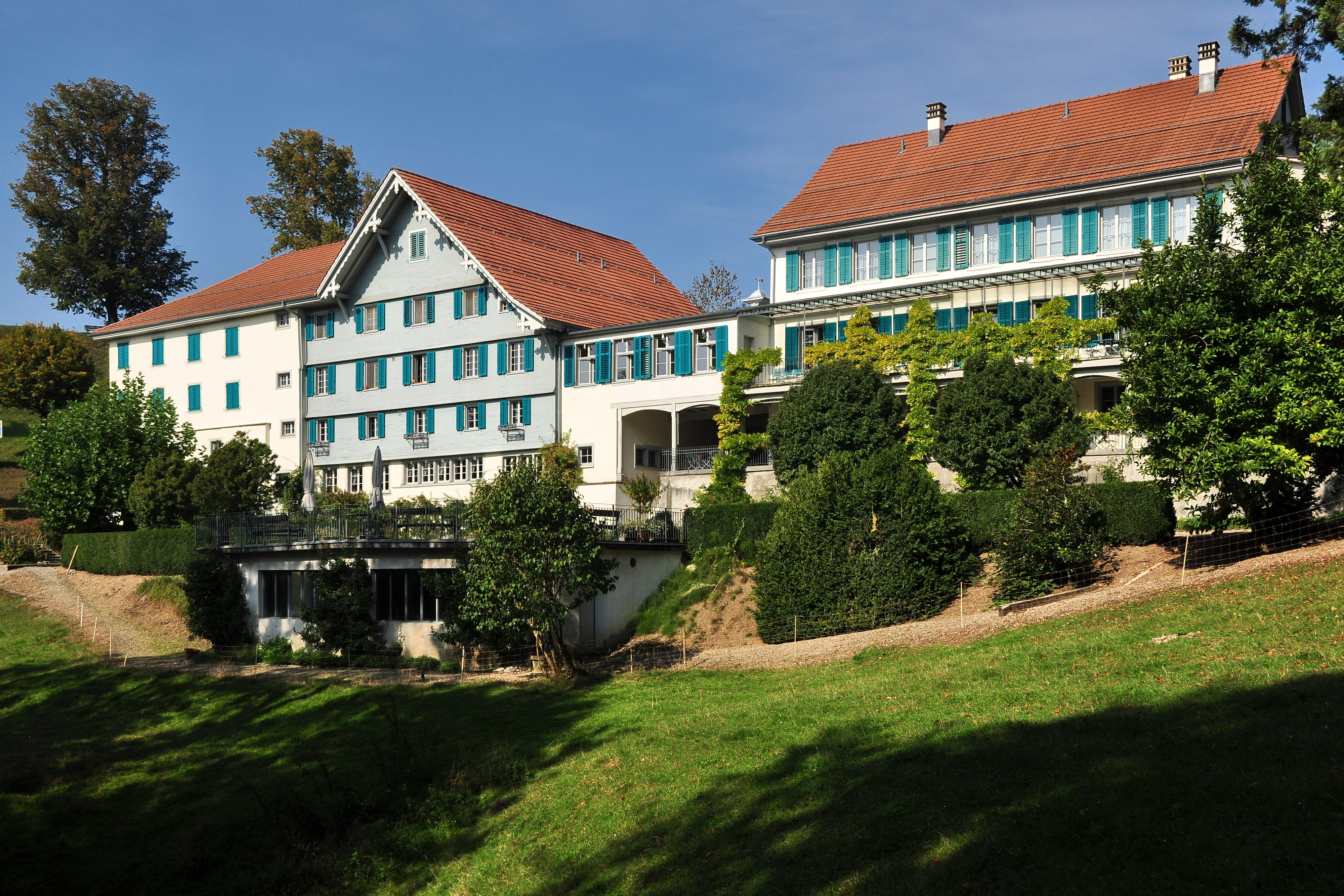 Ehemaliges Kurhaus «Gyrenbad» in Turbenthal (Switzerland)